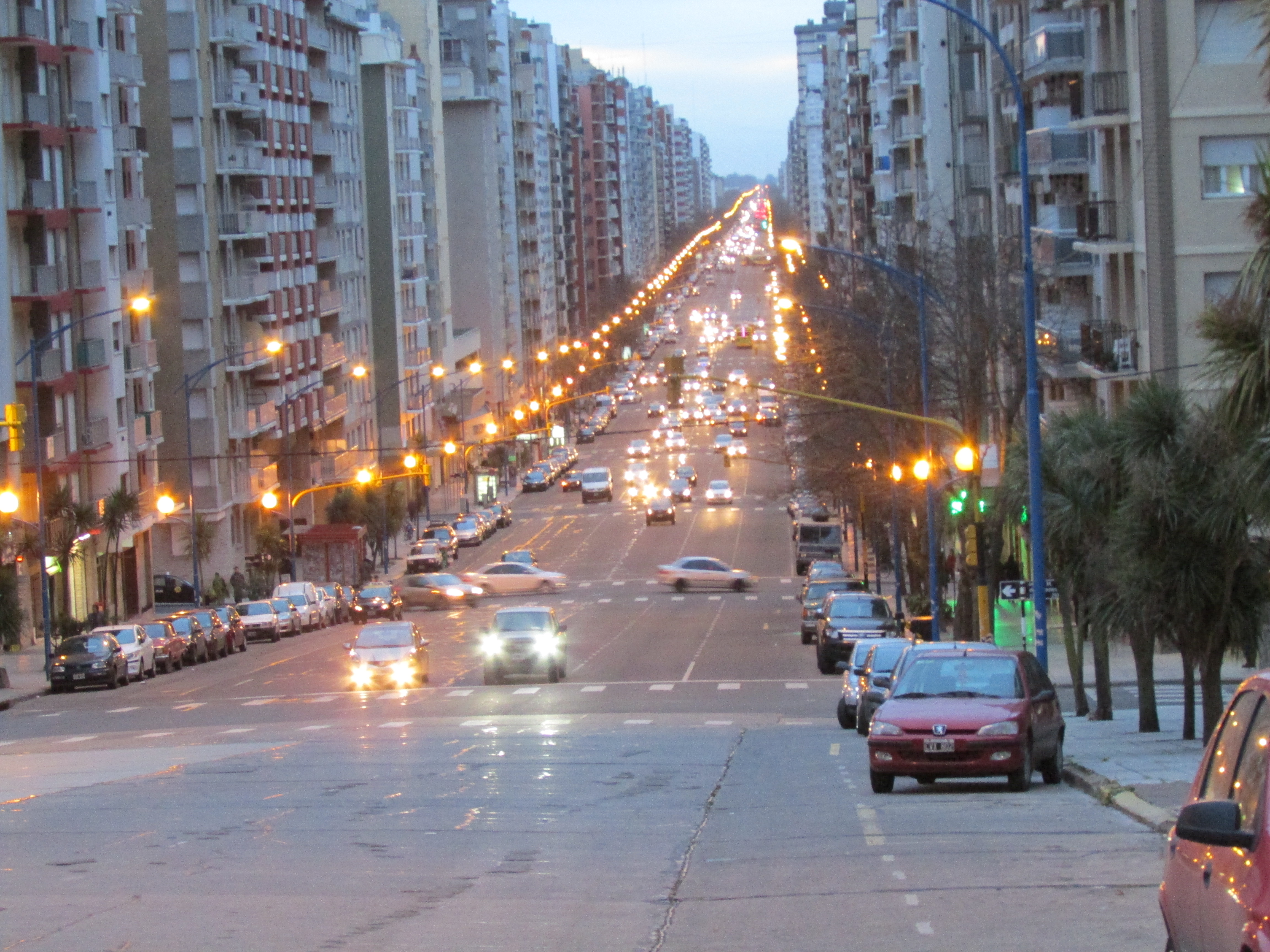 Avenida Colón al atardecer en Mar del Plata, provincia de Buenos Aires, Argentina.